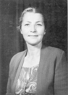 Peace activist Idy Hegnauer in 1950